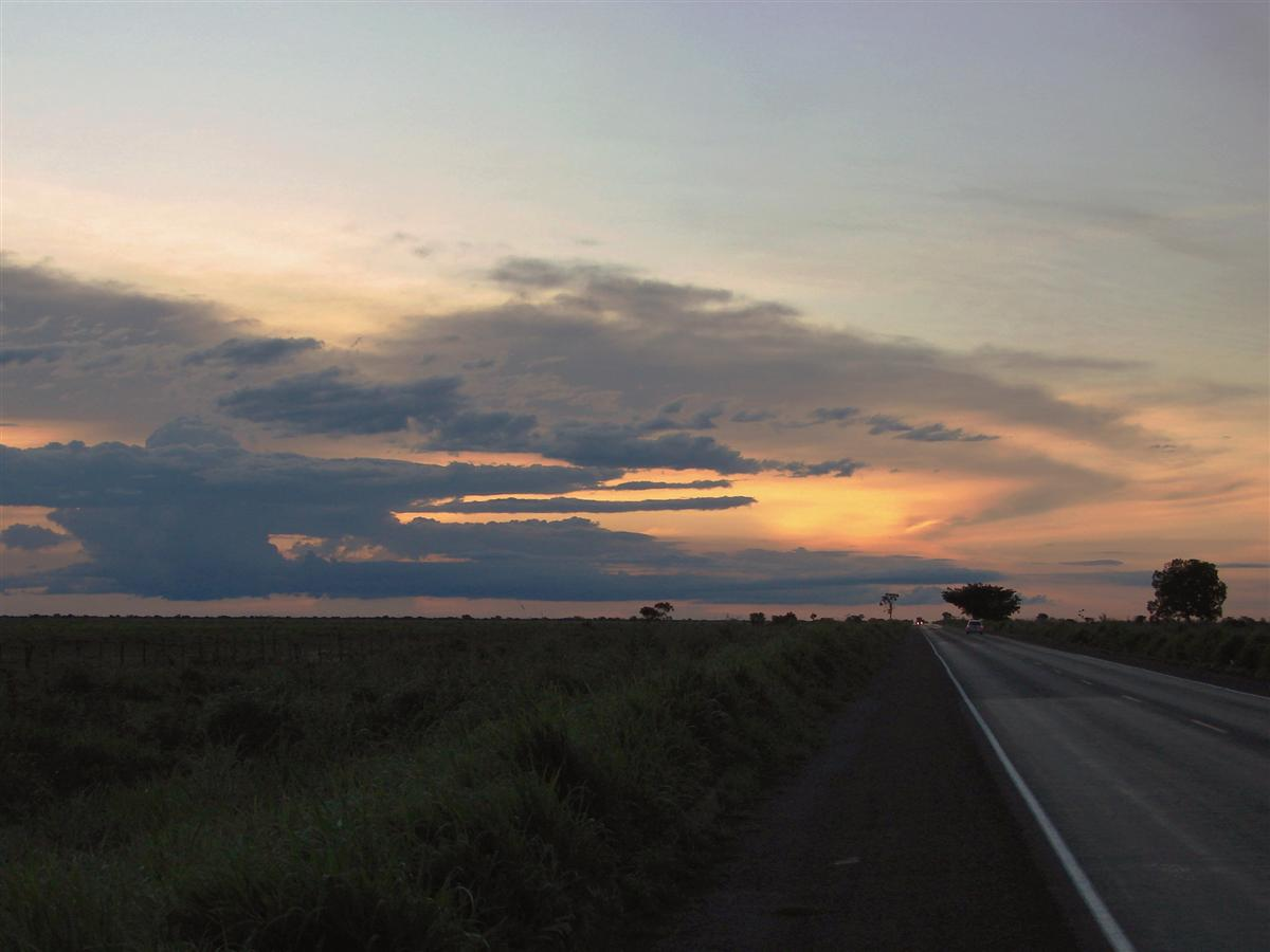 Por do sol em Barreiras-BA